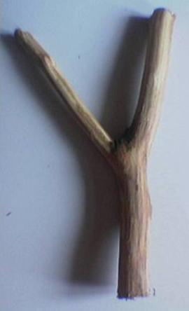 Beschreibung: eine (fast perfekte) Astgabel Quelle: selbst fotografiert Fotograf oder Zeichner: Ryzaan